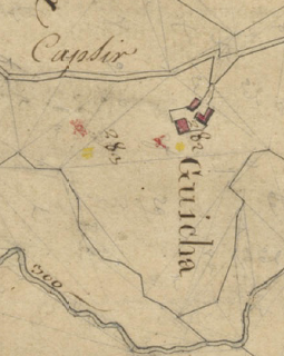 Guixà (Orellà) en el Cadastre napoleònic del 1812 (Arxius Departamentals dels Pirineus Orientals)